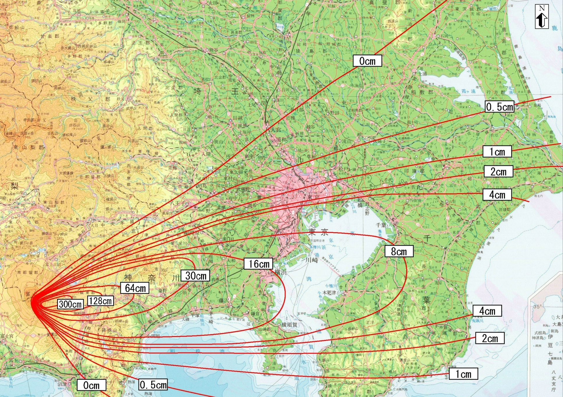 防災対応を検討するための降灰分布図（富士山宝永噴火）